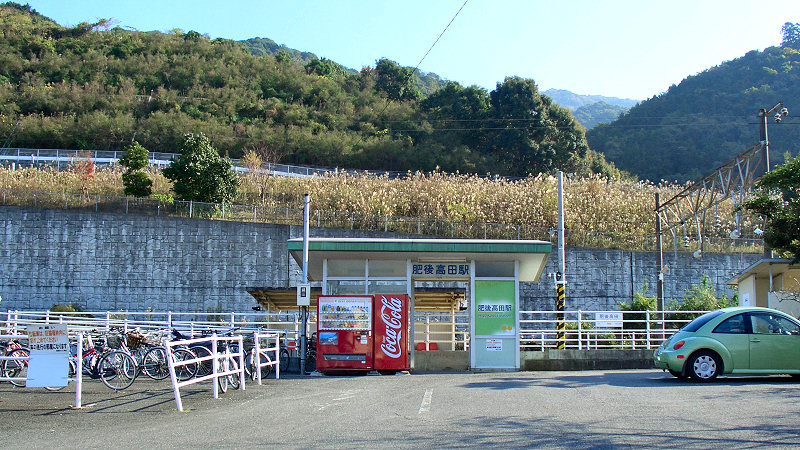 肥薩おれんじ鉄道線肥後高田駅 駅舎 撮影者/著者/著作権保有者 : MK Products (本人がアップロード) 撮影日 : 2006/12/06 肥後高田駅用にアップロードした画像です。良い画像があれば別の画像に変えてください。